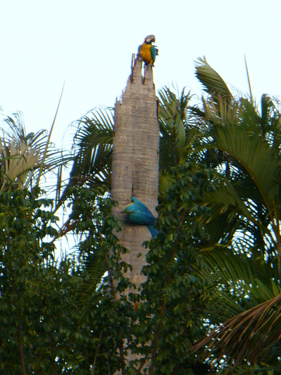 Individuos de Ara ararauna en tronco de Roystonea sp.